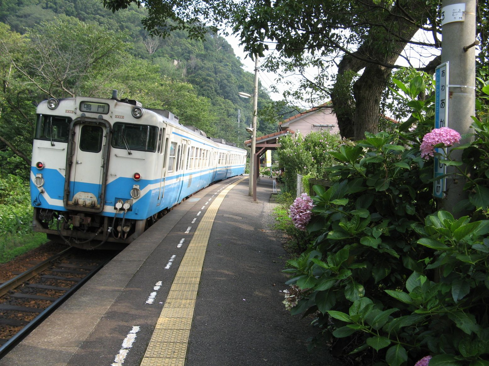 阿波赤石駅 徳島方面行きが発車